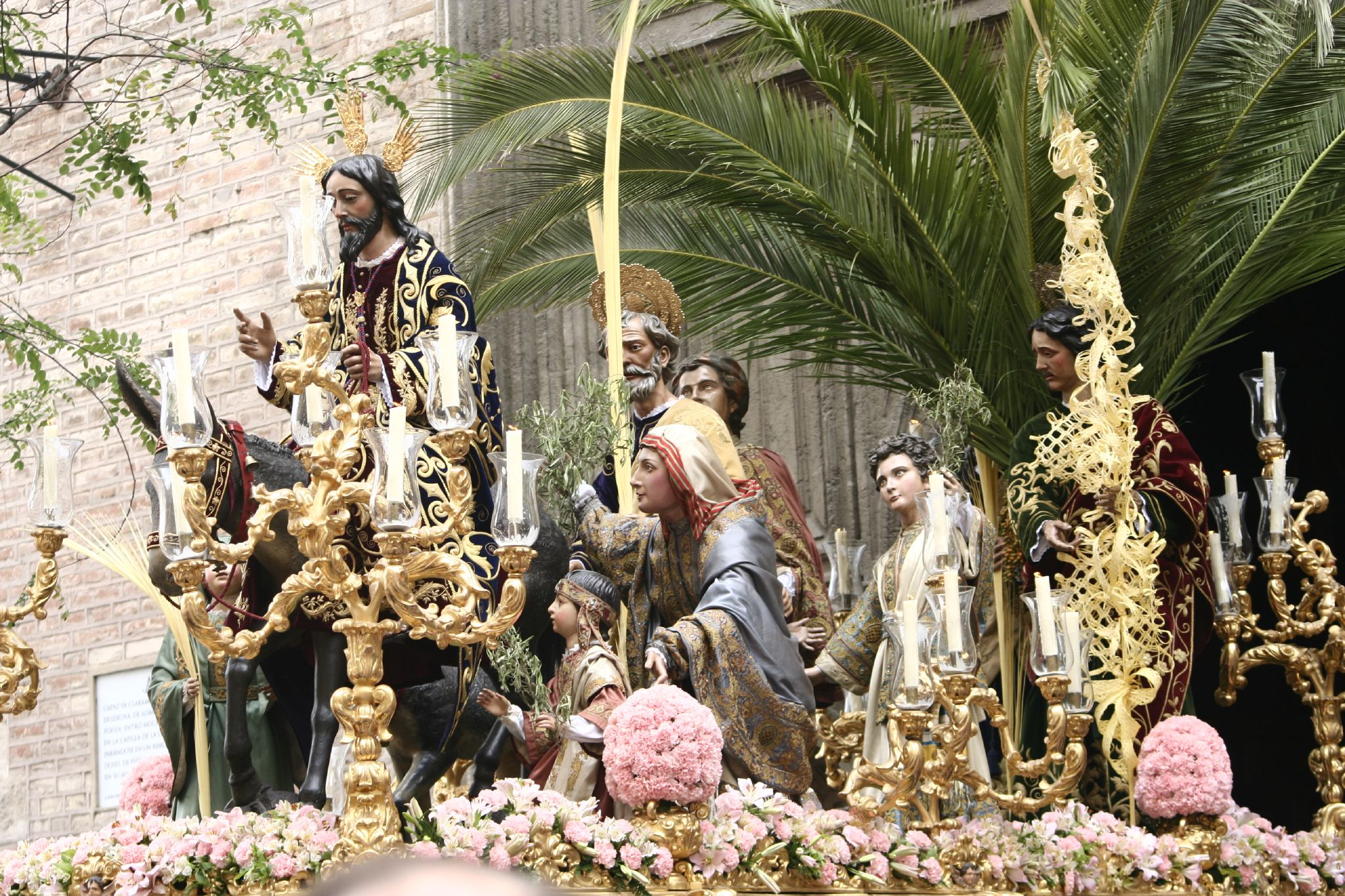 Sagrada entrada en Jerusalén. Semana Santa en Sevilla. Año 2006 Foto realizada y propiedad de Ángel Cachón